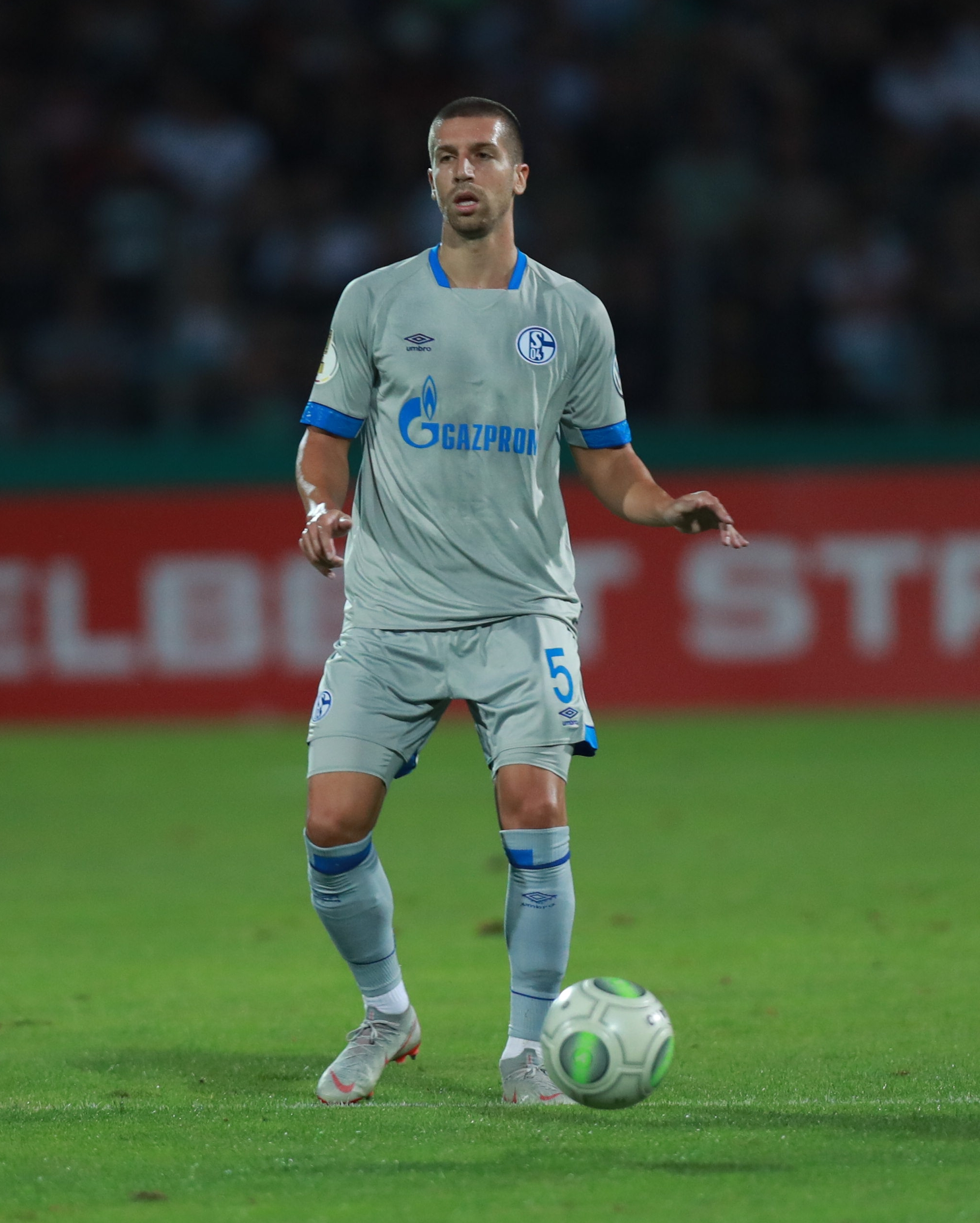 DFB-Pokal 2018/19, 1. Hauptrunde: 1. FC Schweinfurt 05 gegen FC Schalke 04 0:2 (0:1)